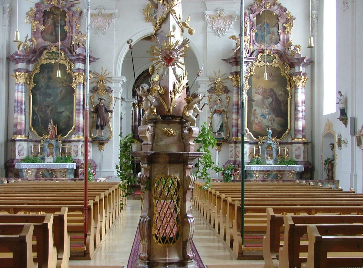 Kloster Heilig Kreuz (Kempten)